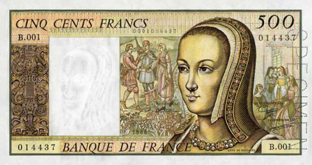 500 frankos francia bankjegyterv előoldala, "Bretagne-i Anna és a reneszánsz - típus". Mérete: 183 X 98 mm.